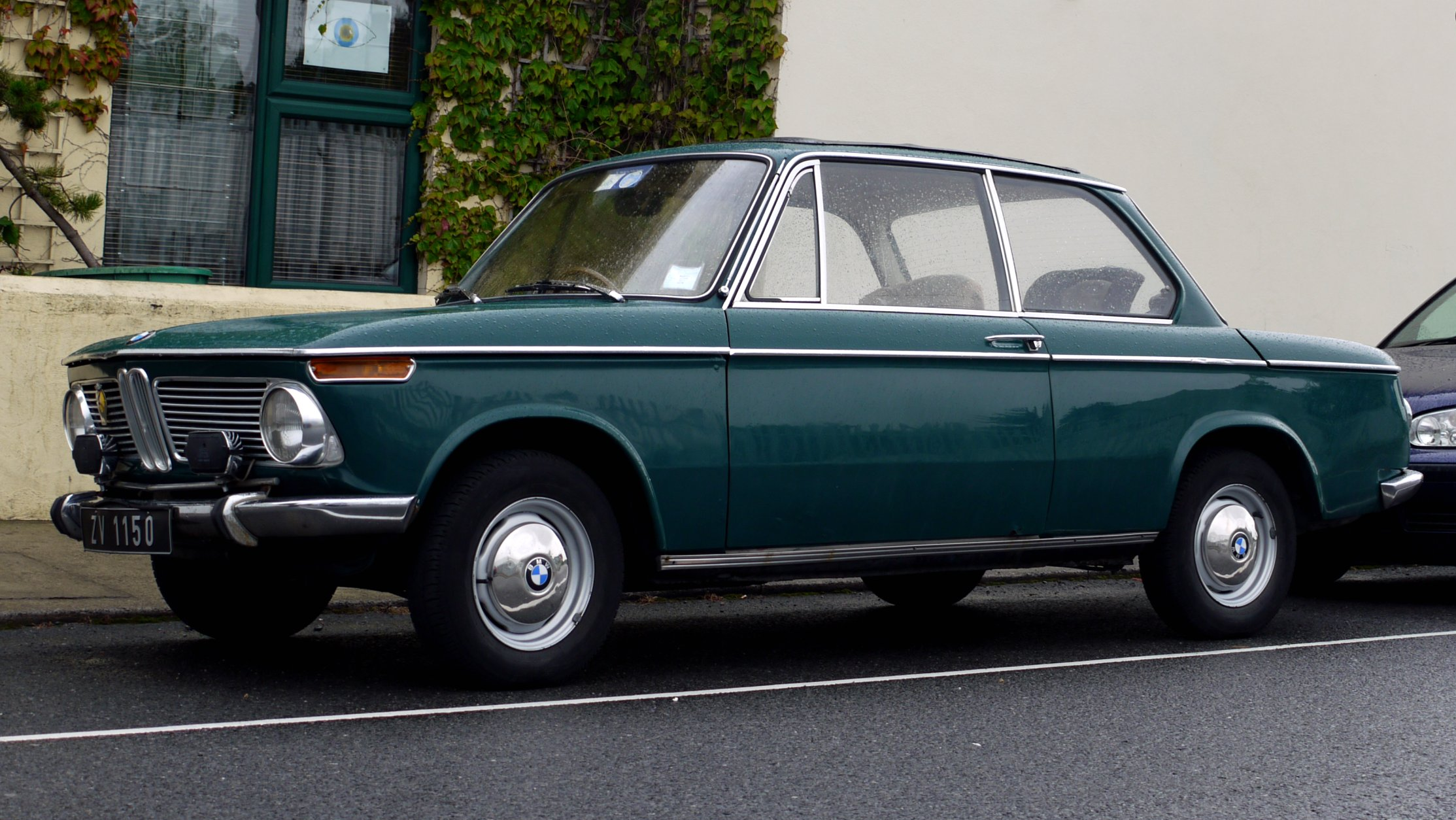 1964–1968 BMW 1600.